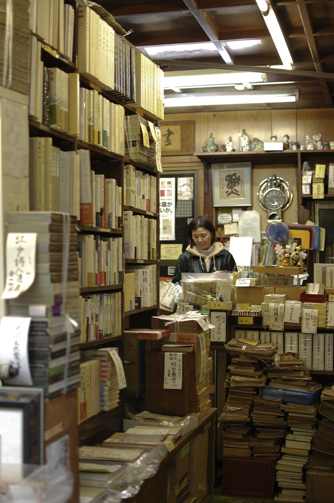 松雲堂書店。東京都千代田区神田神保町3丁目。地図はこちら。